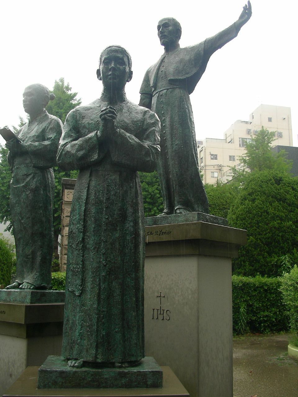 ザビエル公園のフランシスコ・ザビエル、ヤジロウ、鹿児島のベルナルドの像